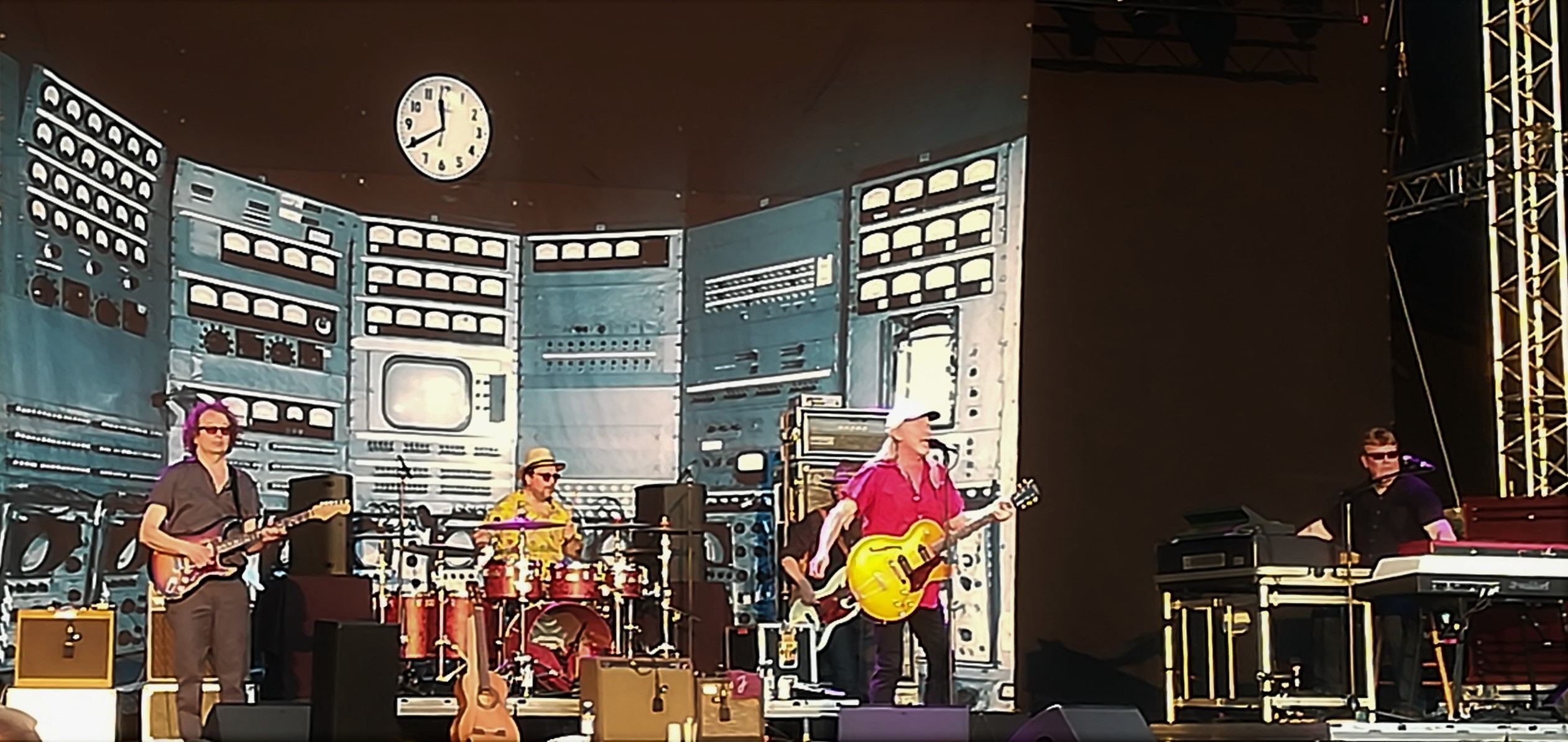 J Karjalaisen keikka kesällä 2019. Mikko Lankinen kuvassa vasemmalla.